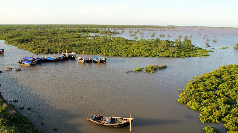 Coastal area of ​​Kim Son district Khu dự trữ sinh quyển châu thổ sông Hồng